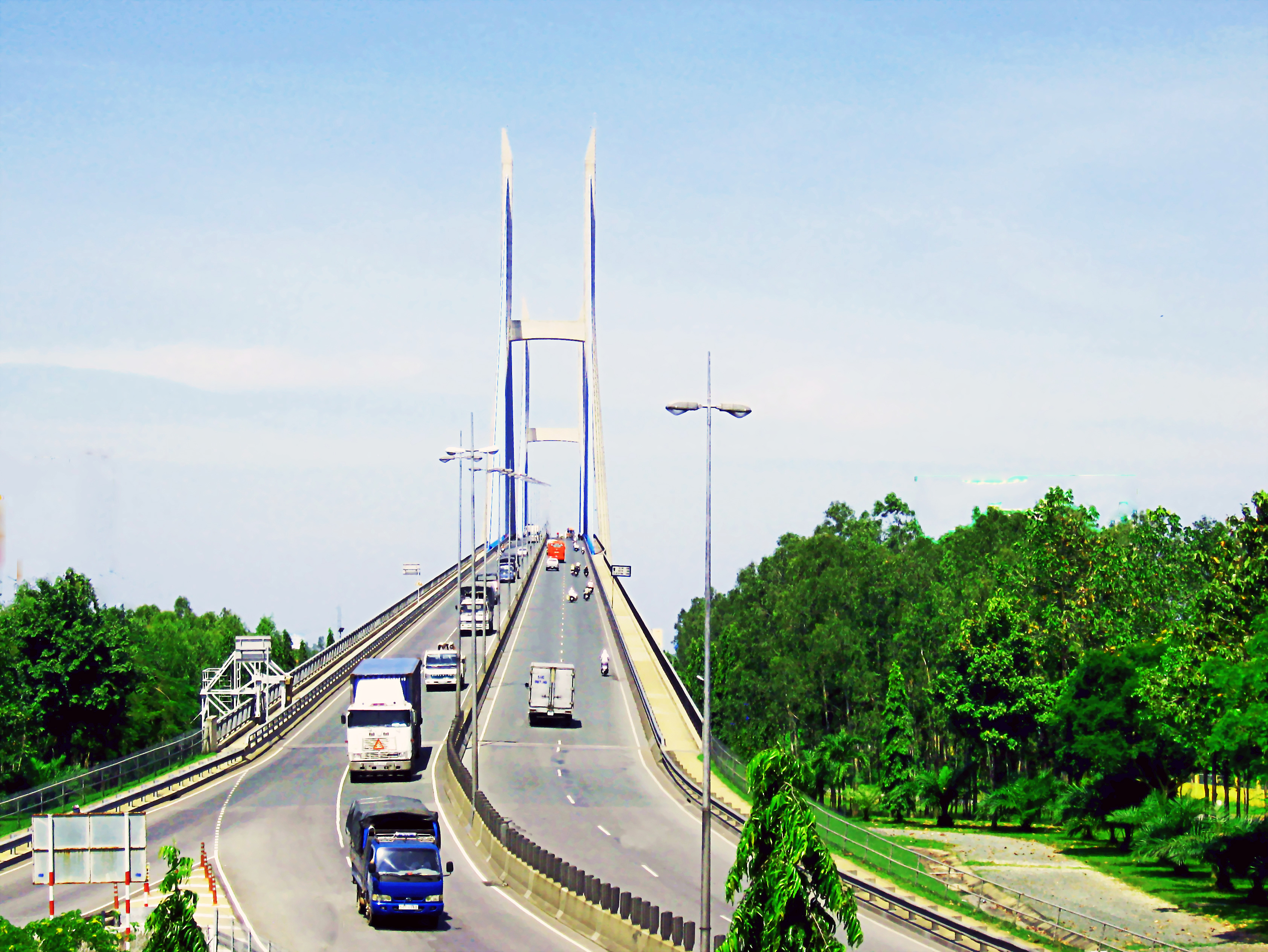 Cầu Mỹ Thuận nối liền giữa hai tỉnh Tiền Giang và Vĩnh Long, thuộc Việt Nam.